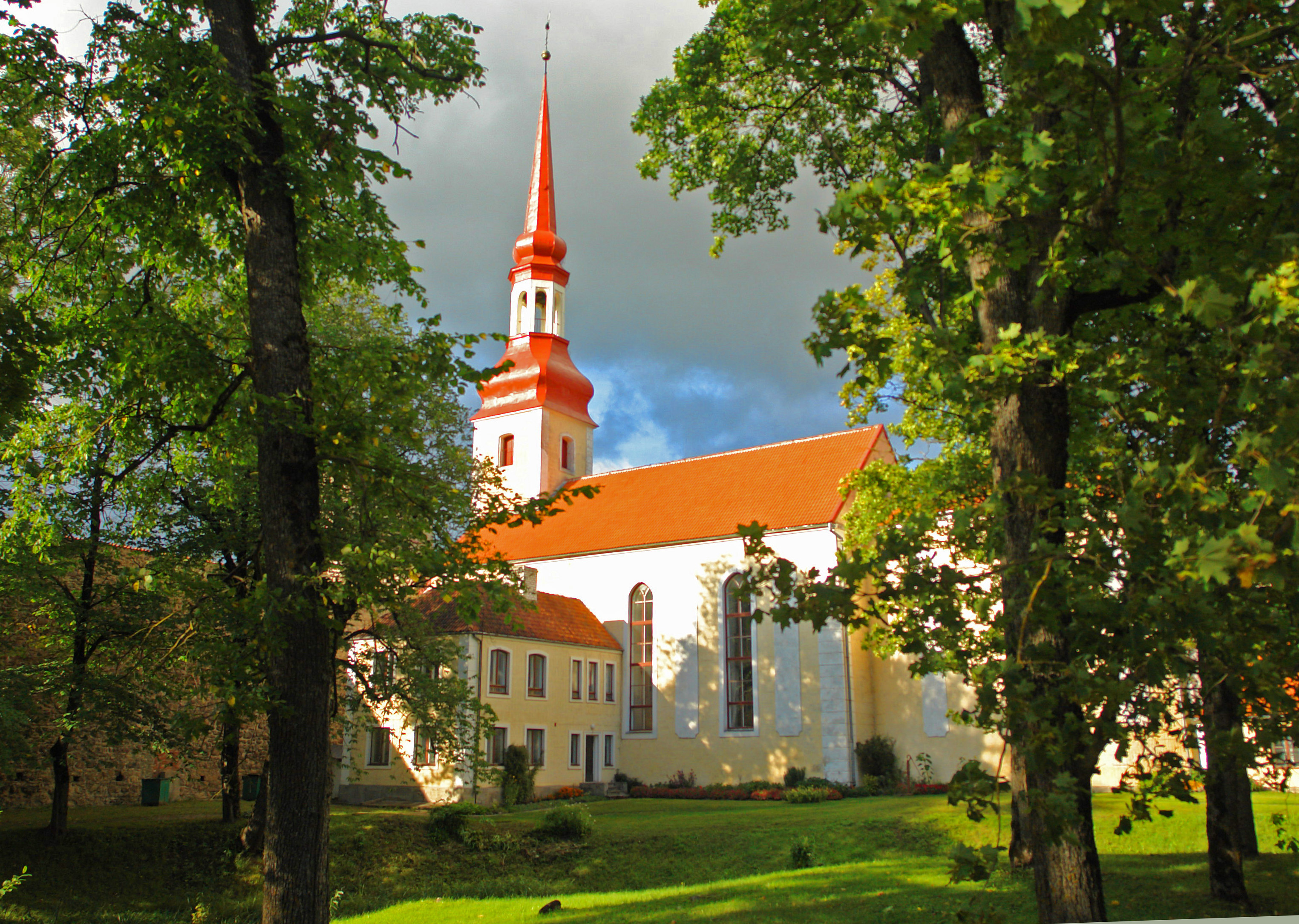 Põltsamaa kirik